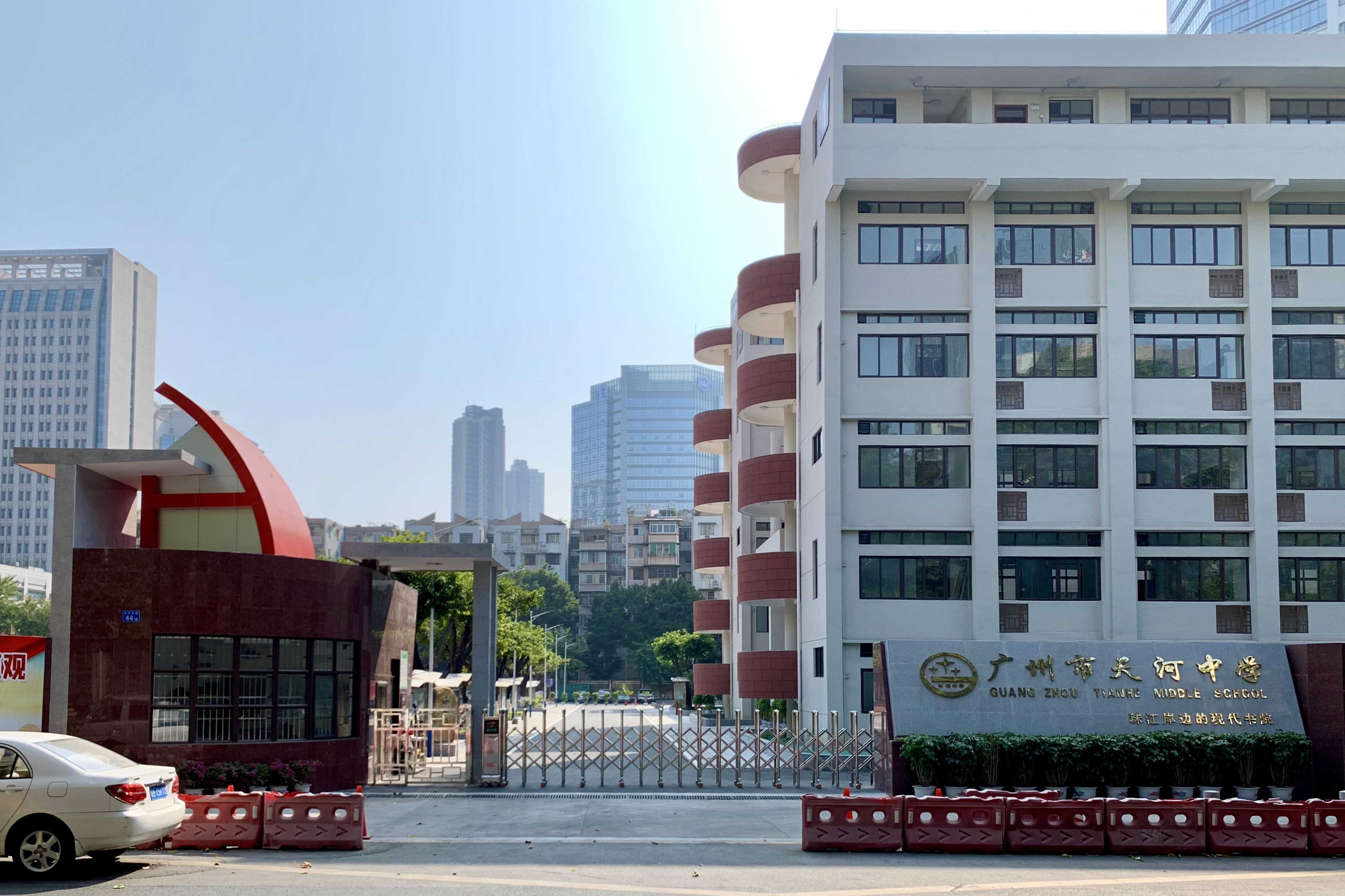 广州市天河中学天河东校区校门